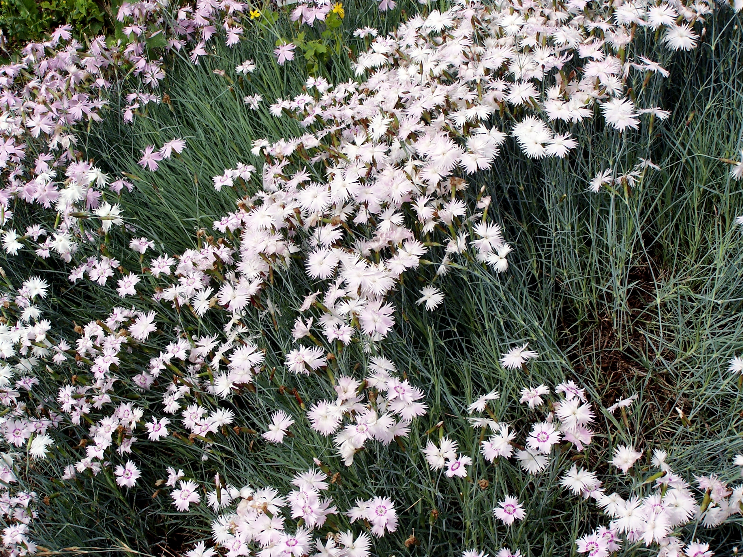 Dianthus caryophyllus 17 juin 2006 Vieux jardin botanique de Göttingen